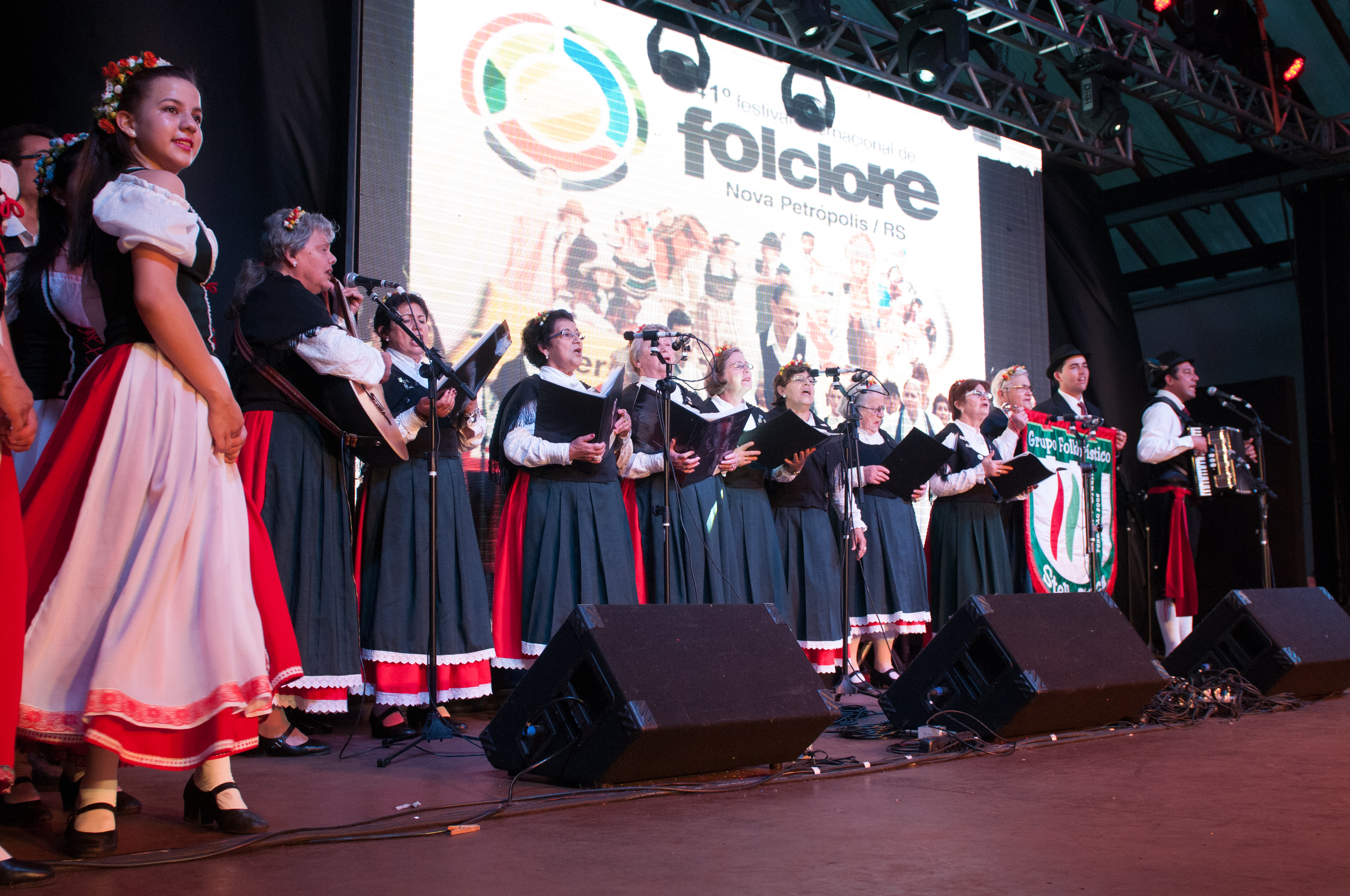 Apresentação do Grupo Stella Bianca em Nova Petropolis - RS